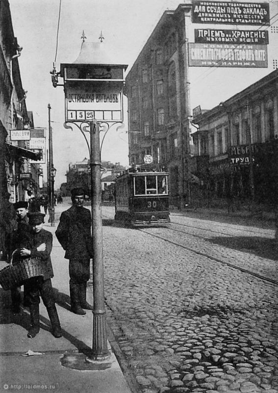 Трамвай на Большой Дмитровке